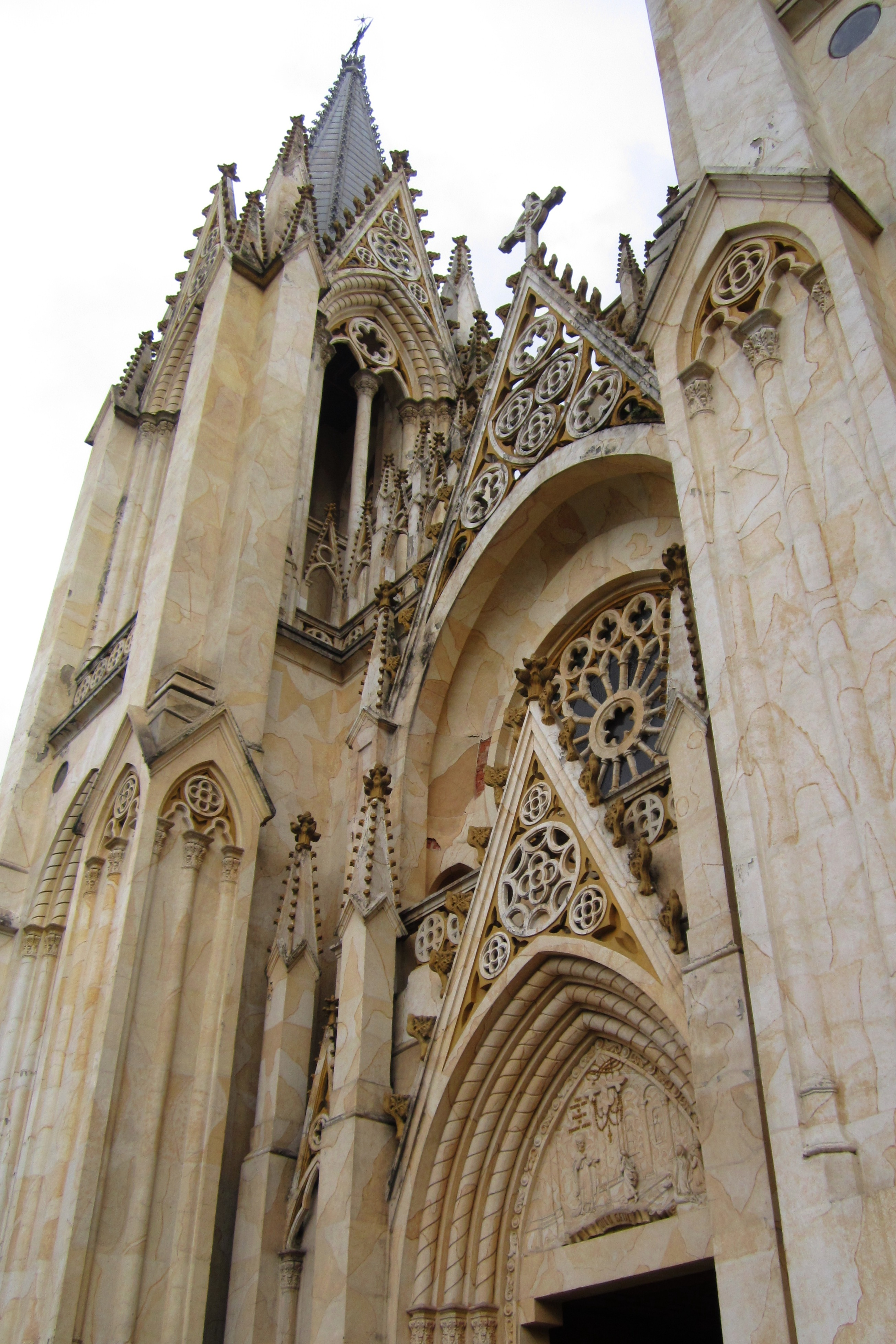 Bogotá, localidad de Los Mártires, entrada de la iglesia gótica de San Façon.